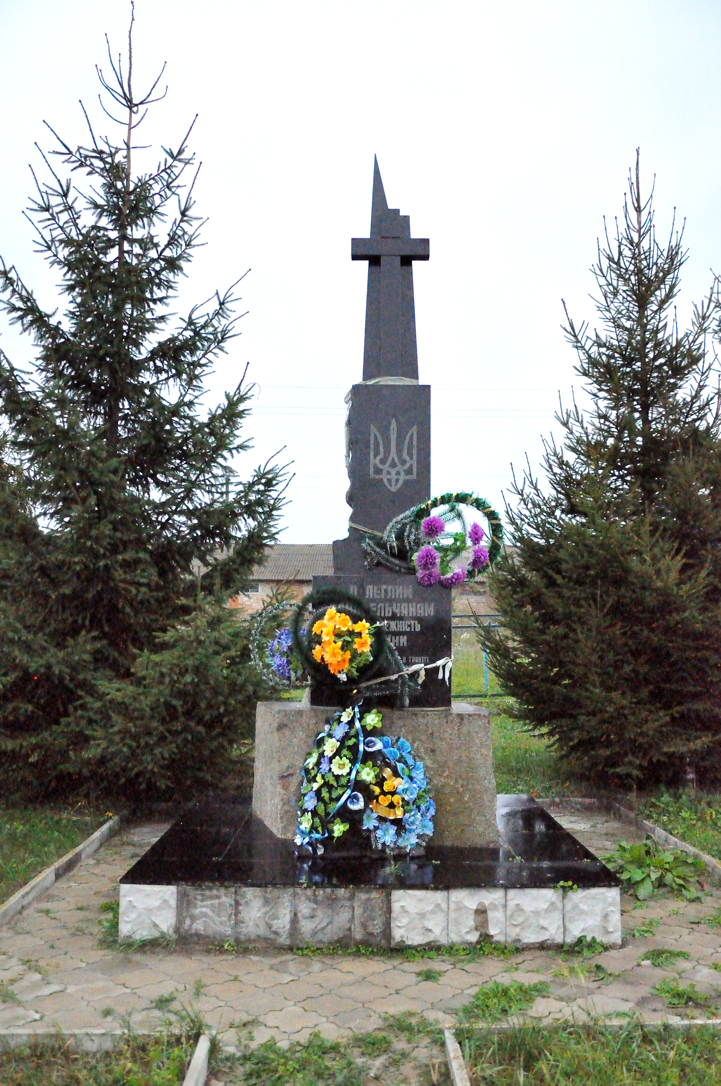 Братська могила радянських воїнів, с. Орестів